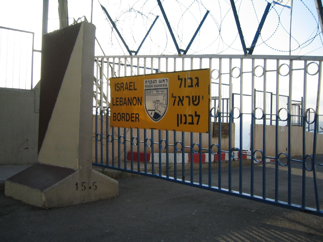 Israel - Lebanon border, Rosh Hanikra